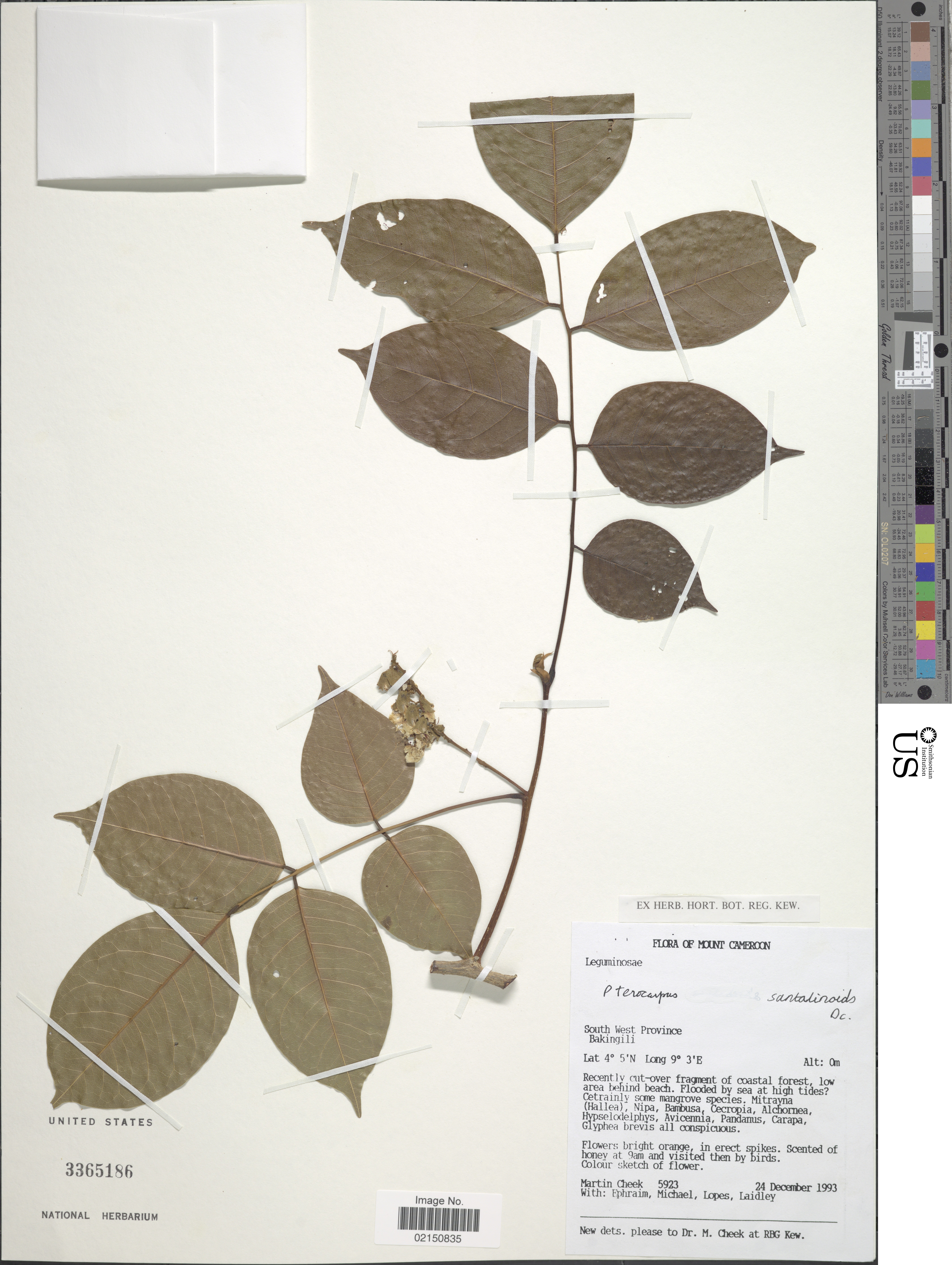 Pterocarpus santalinoides L'Hér. ex DC. Object Details Biogeographical Region 23 - West-Central Tropical Africa Collector Martin R. Cheek -- Ephraim Michael -- Lopes -- Laidley Record Last Modified 24 Jan 2018 Specimen Count 1 Collection Date 24 Dec 1993 Barcode 02150835 USNM Number 3365186 Place Mount Cameroon. South West Province. Bakingili, Sud-Ouest, Cameroon, Africa Published Name Pterocarpus santalinoides L'Hér. ex DC. Taxonomy Plantae Dicotyledonae Rosales Fabaceae Faboideae NMNH - Botany Dept. Record ID nmnhbotany_13861219 Usage of Metadata (Object Detail Text) CC0 GUID (Link to Original Record)